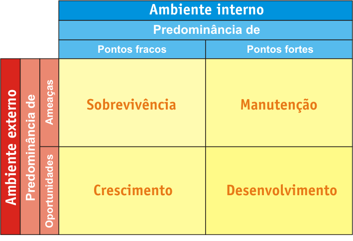 AnÃ¡lise SWOT.